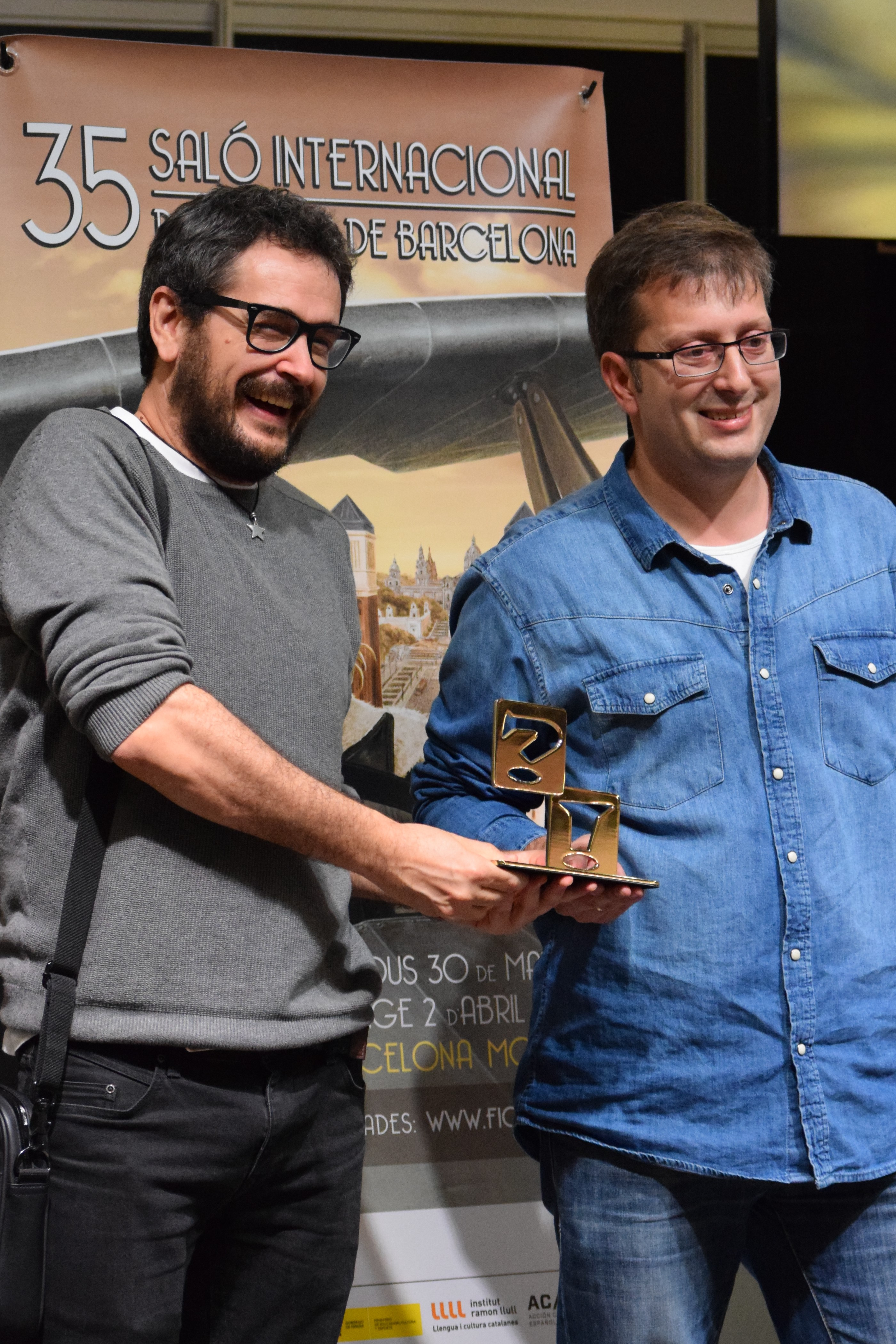 Carlos Díaz Correia i Jacobo Márquez mostrant el premi a la millor obra per votació popular, atorgat al còmic Fantasy West. Saló Internacional del Còmic de Barcelona de 2017. Divendres 31 de març de 2017.